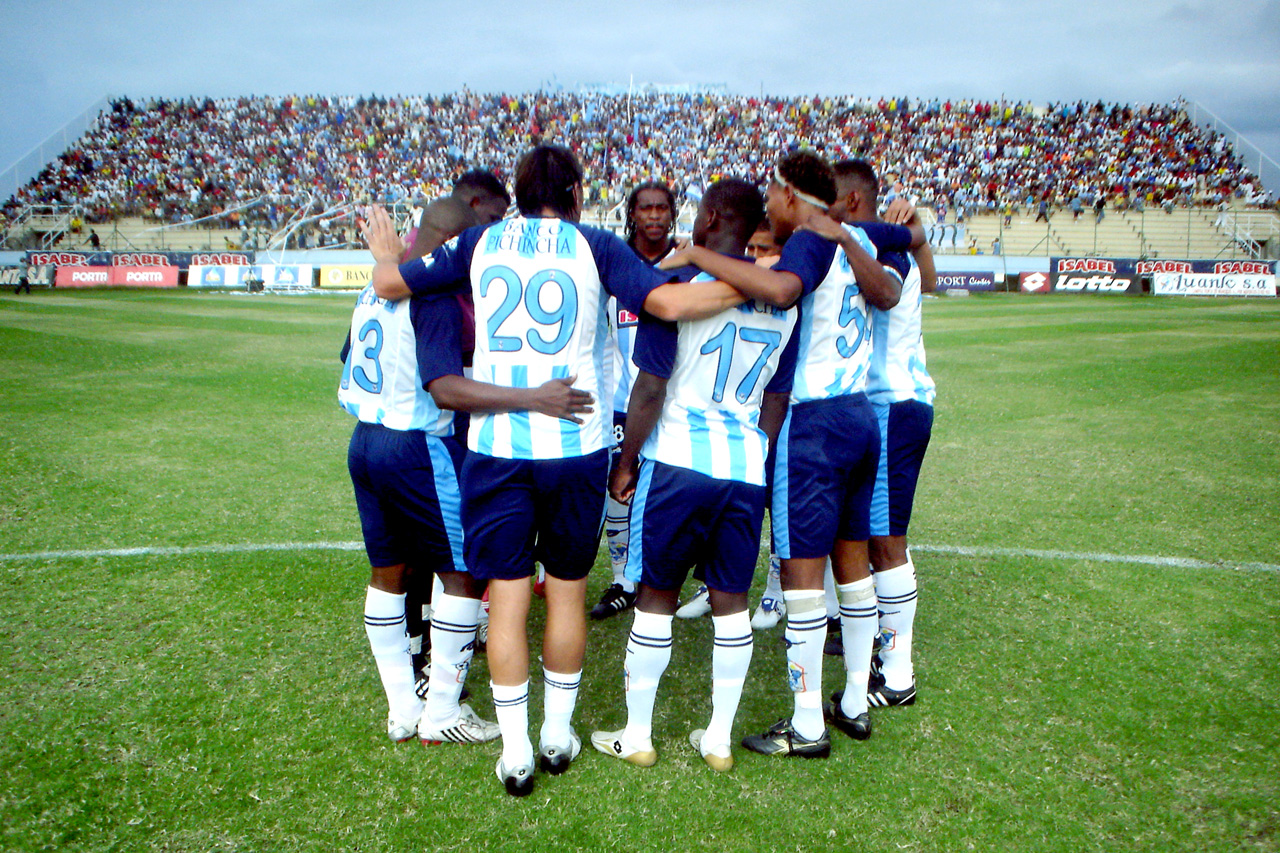 Jugadores del Manta Fútbol Club antes de empezar un partido. Atrás, la general Norte del Estadio Jocay de Manta.